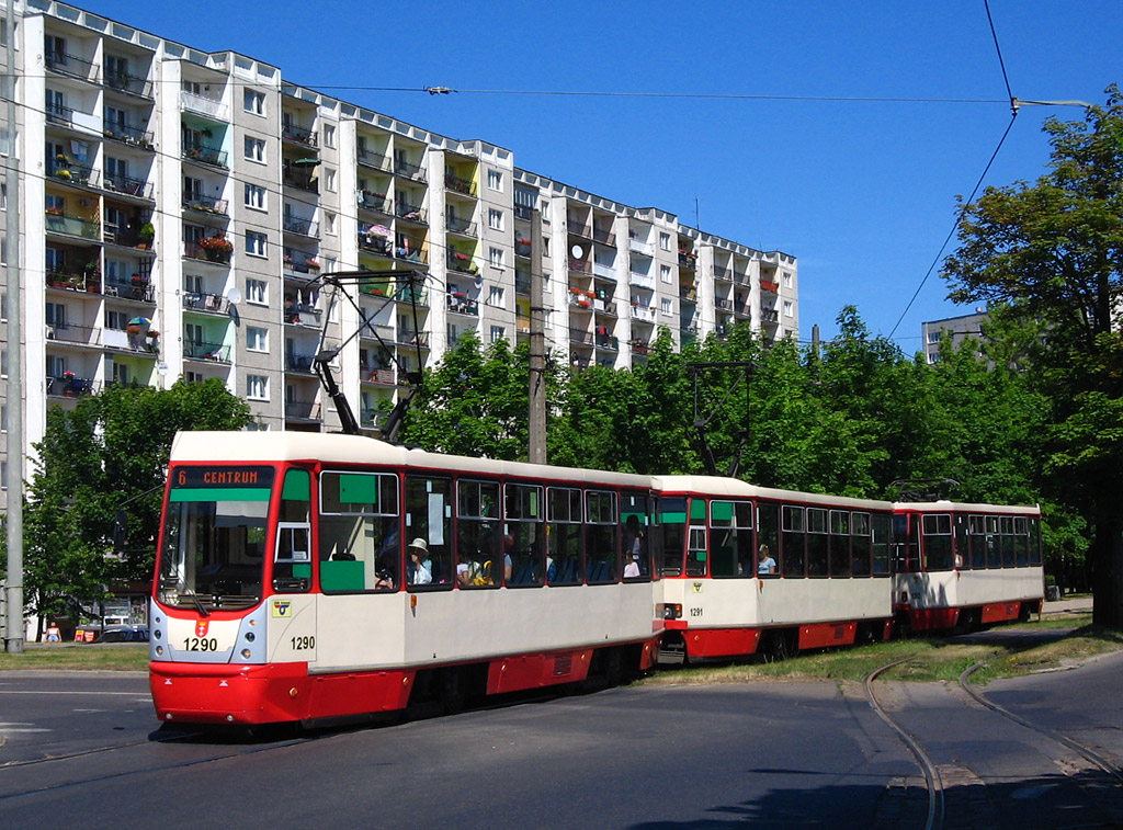 Trzywagonowy skład 105Na na ul. Pomorskiej w Gdańsku. Skład przeszedł modernizację w Zakładzie Remontu Taboru MPK Łódź, która objęła m.in. wymianę ścian czołowej i tylnej skrajnych wagonów w składzie (translation needed!). Autor: Marcin Czapnik